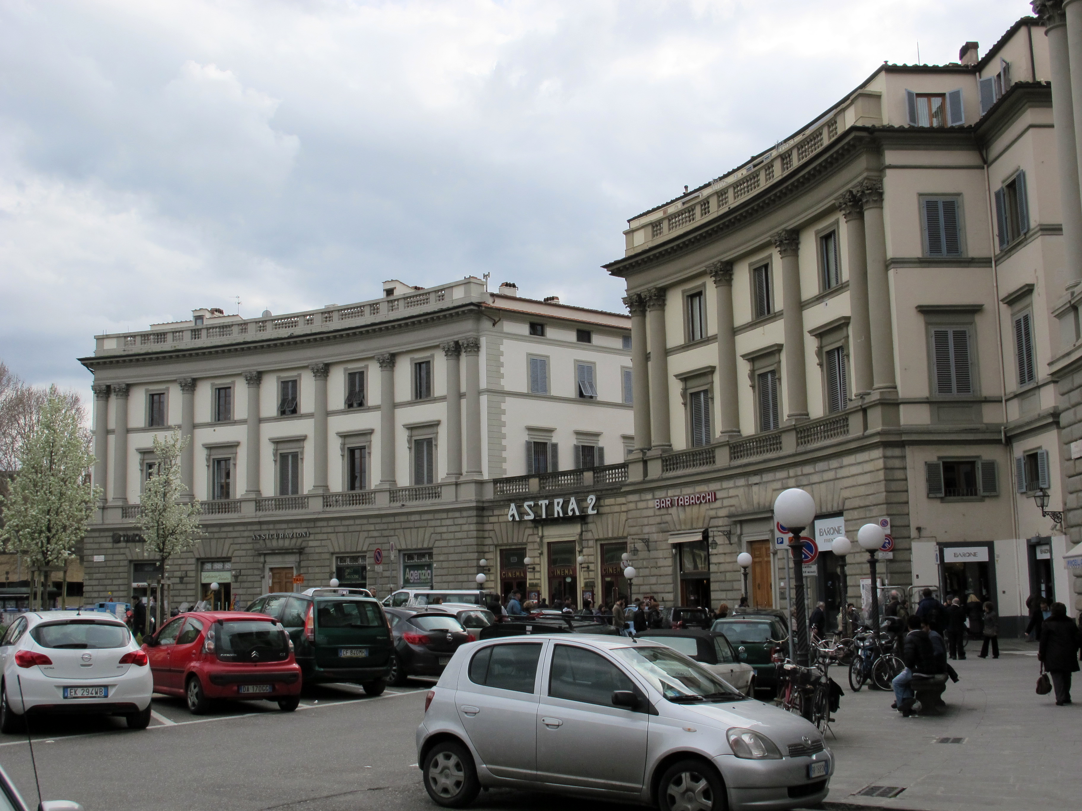 Piazza beccaria, edifici